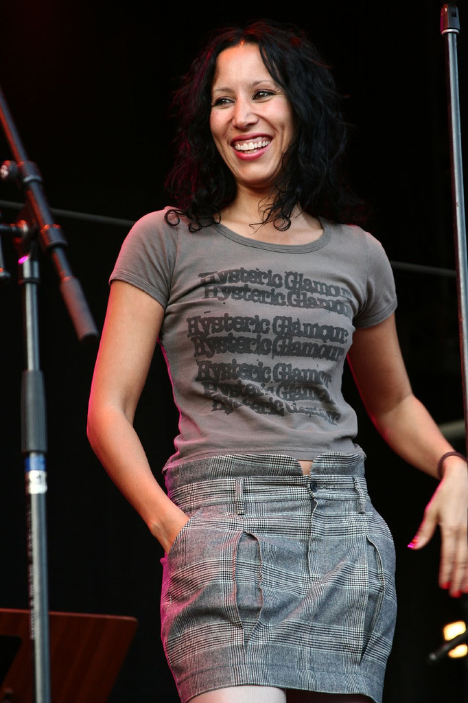 Titiyo during Stockholm Pride 2007